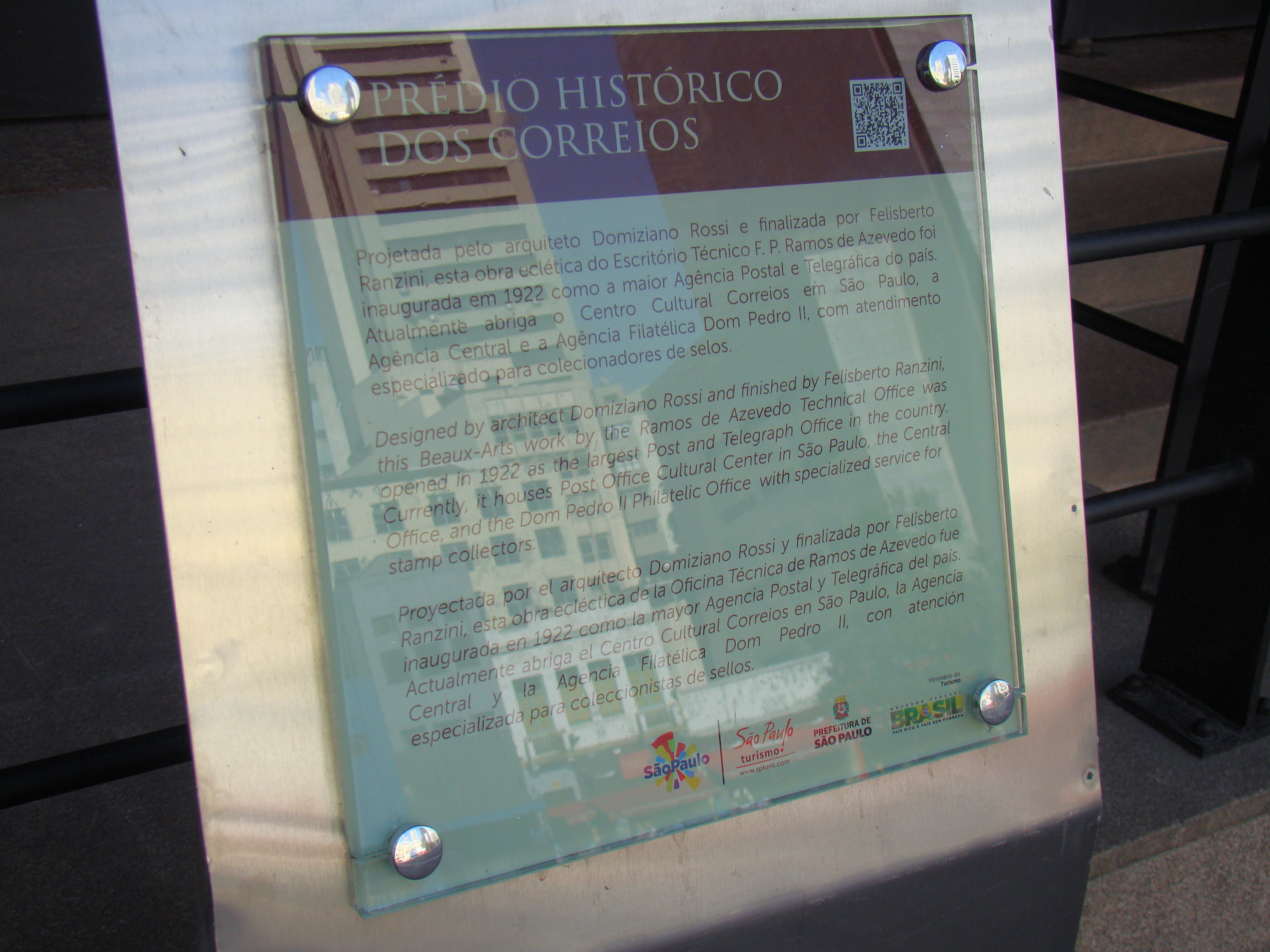 Placa informativa instalada na frente do Palácio dos Correios, em São Paulo (SP), Brasil.